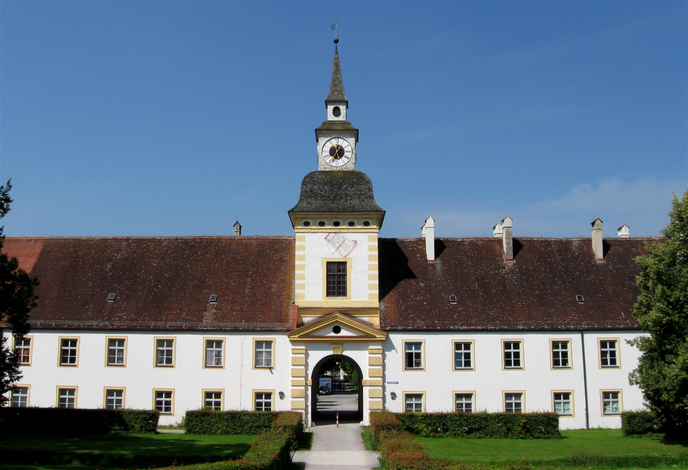 Uhrenturm, Altes Schloss Schleißheim